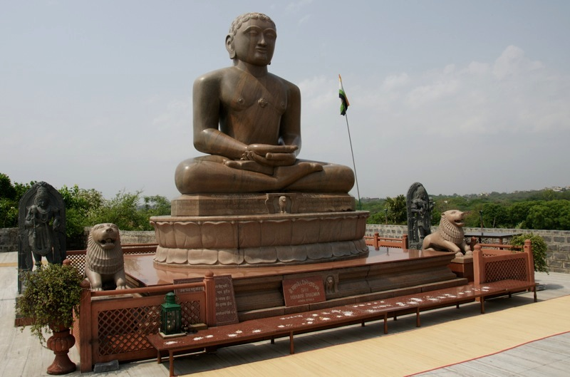 ahimsa sthal